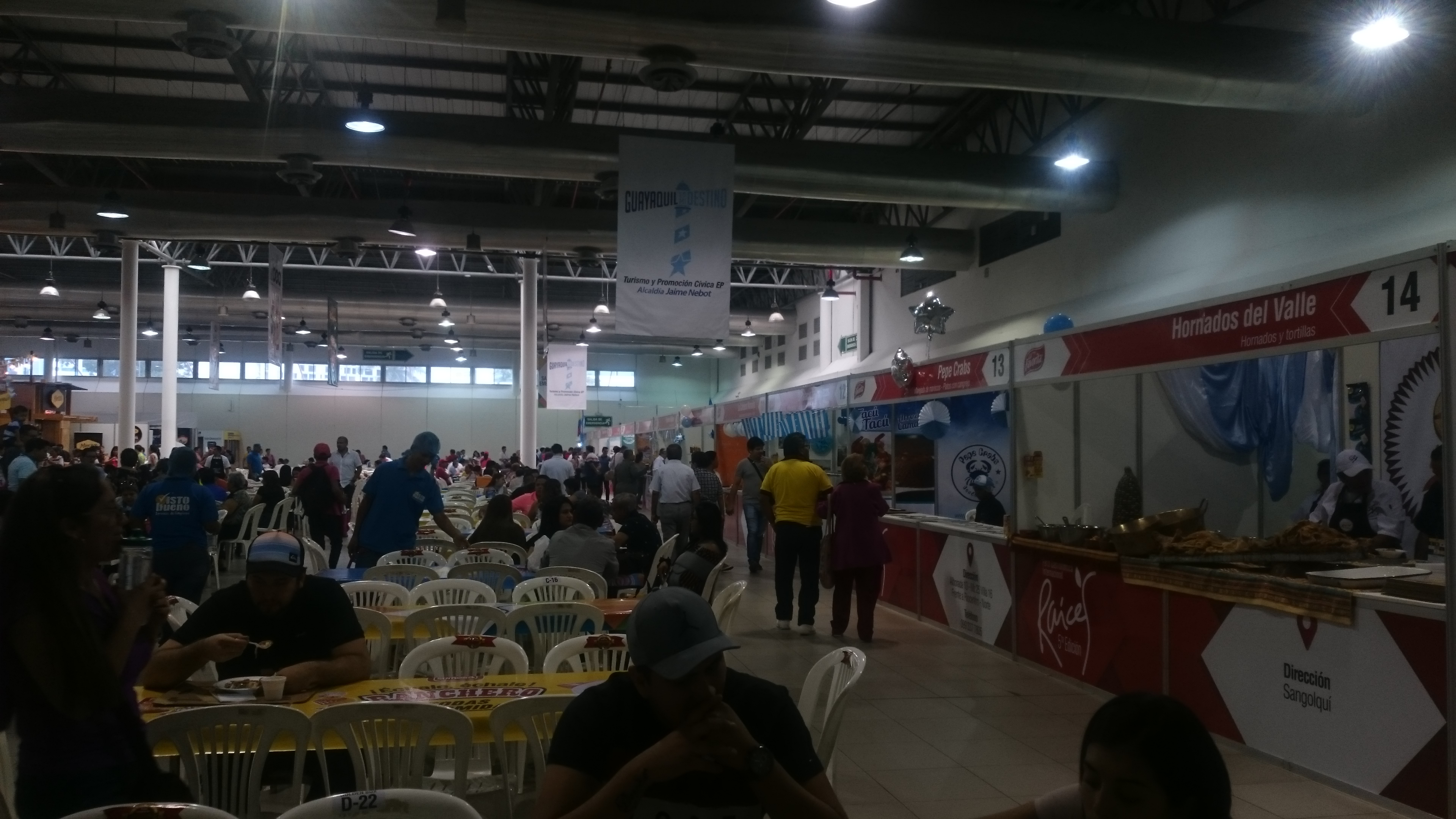 hall general de la feria Raíces con comedor y stands